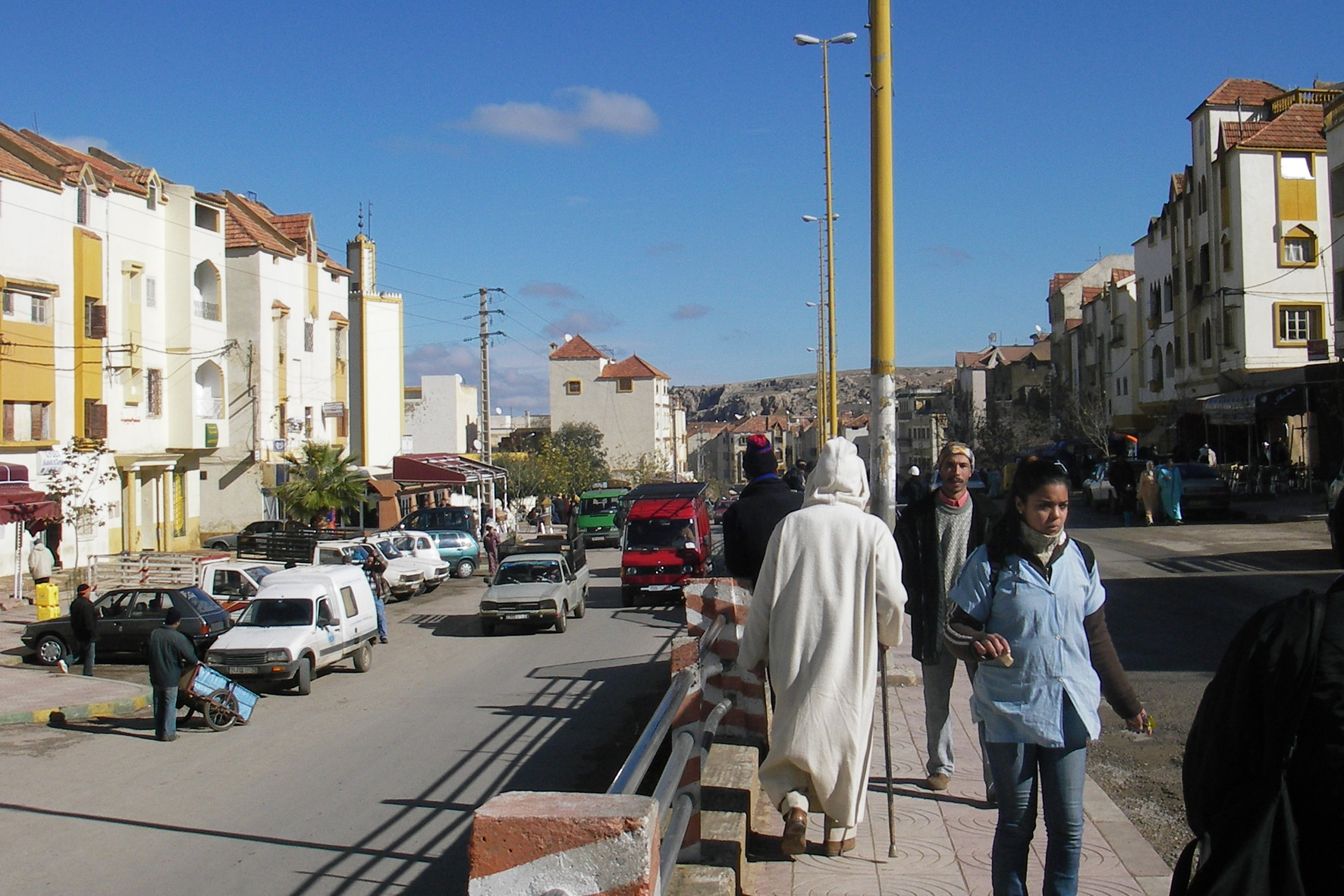 Avenue Hassan II à El Hajeb (Maroc)